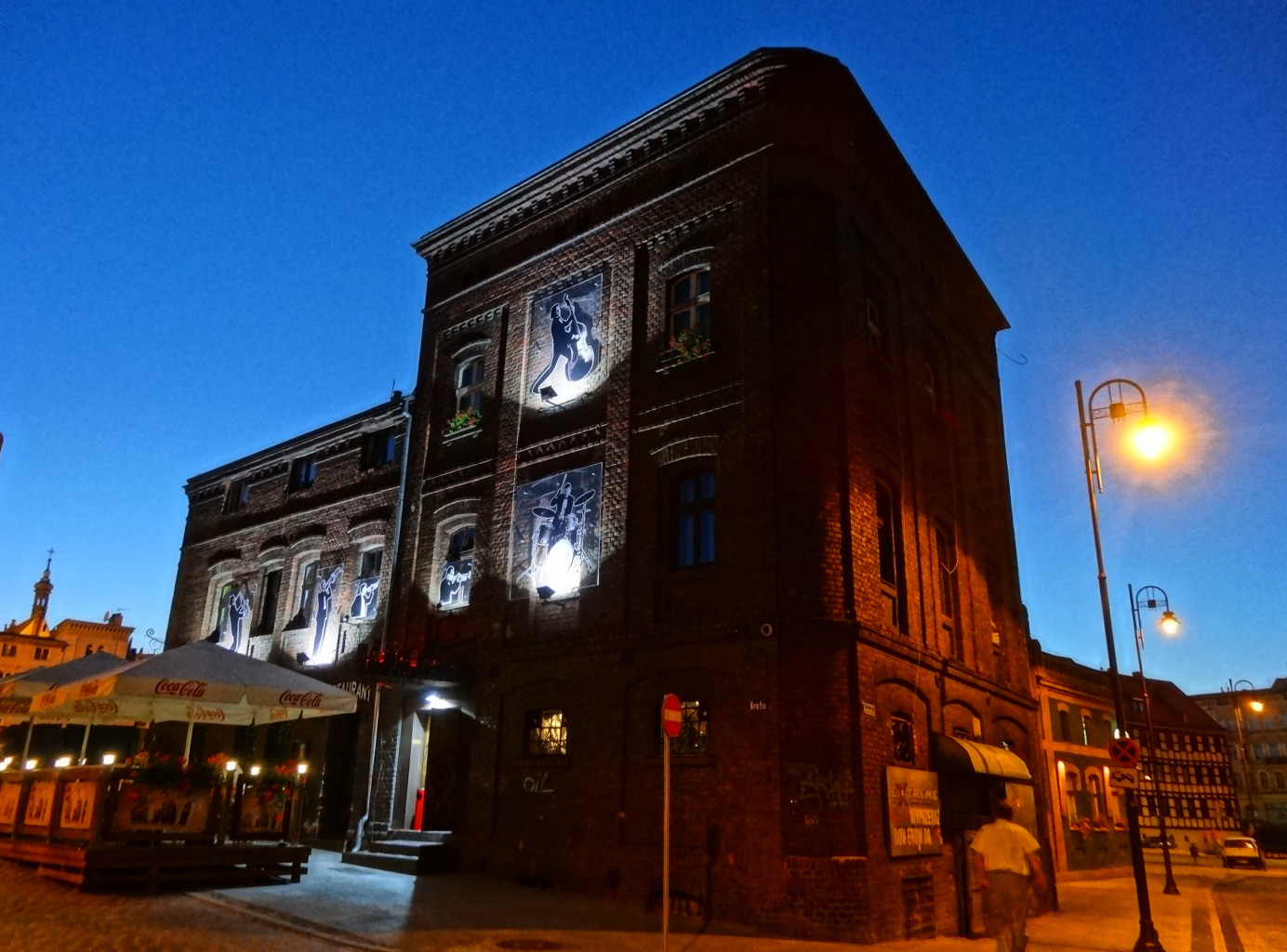 Budynek na rogu ul. Krętej i Podwale w Bydgoszczy, mieszczący klub muzyczny Eljazz